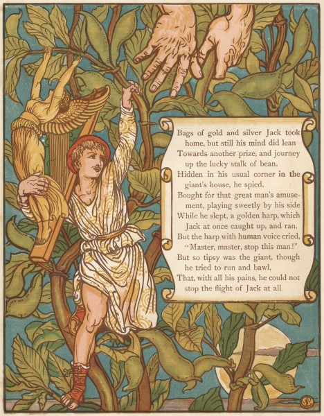 Гравюры по рисункам Крейна к сказкам «Синяя Борода», «Спящая Красавица», «Красная Шапочка», «Джек и бобовый стебель»